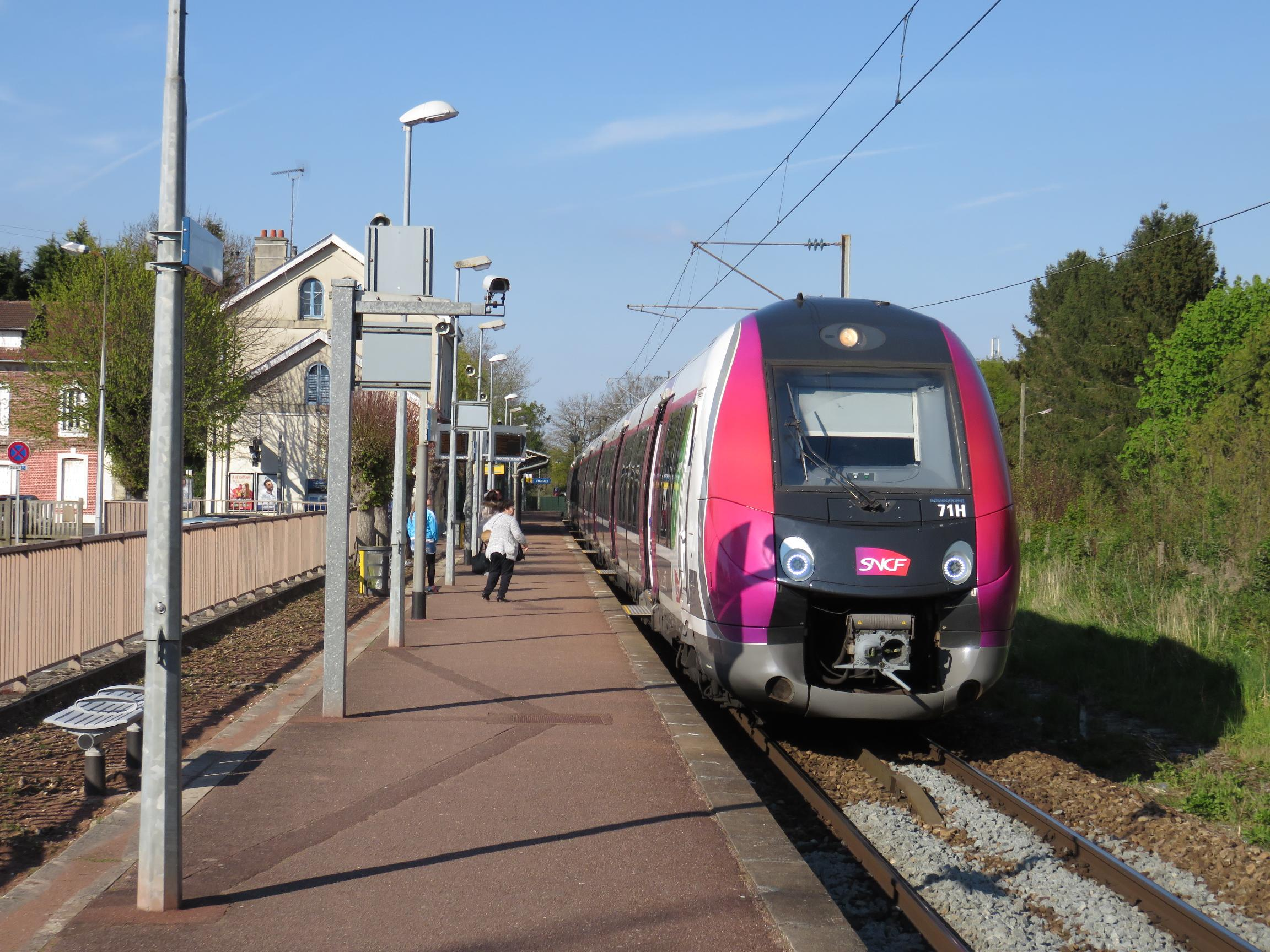 Gare de Viarmes